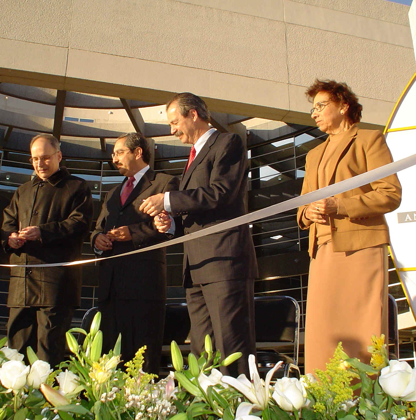 Periodismo 6